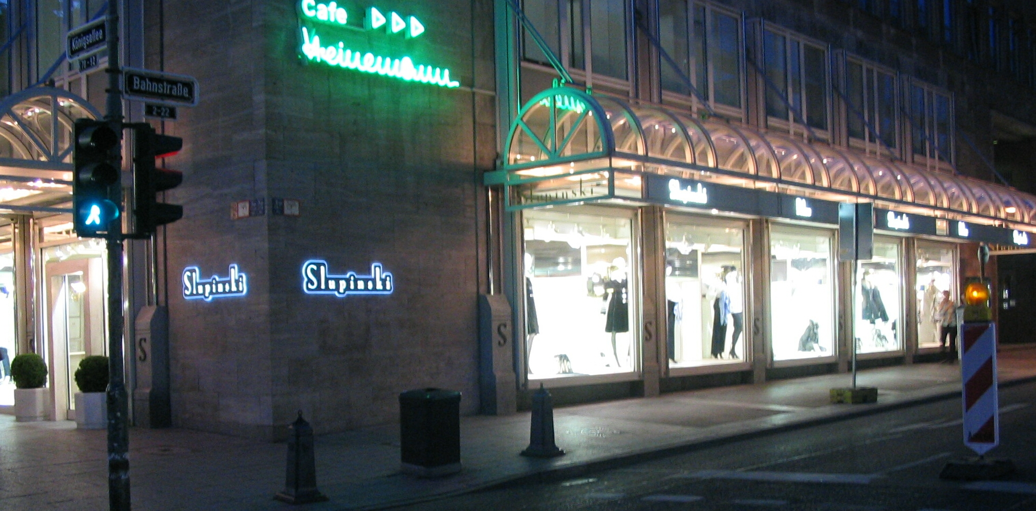 Slupinski, Kürschnerei auf der Düsseldorfer Königsallee